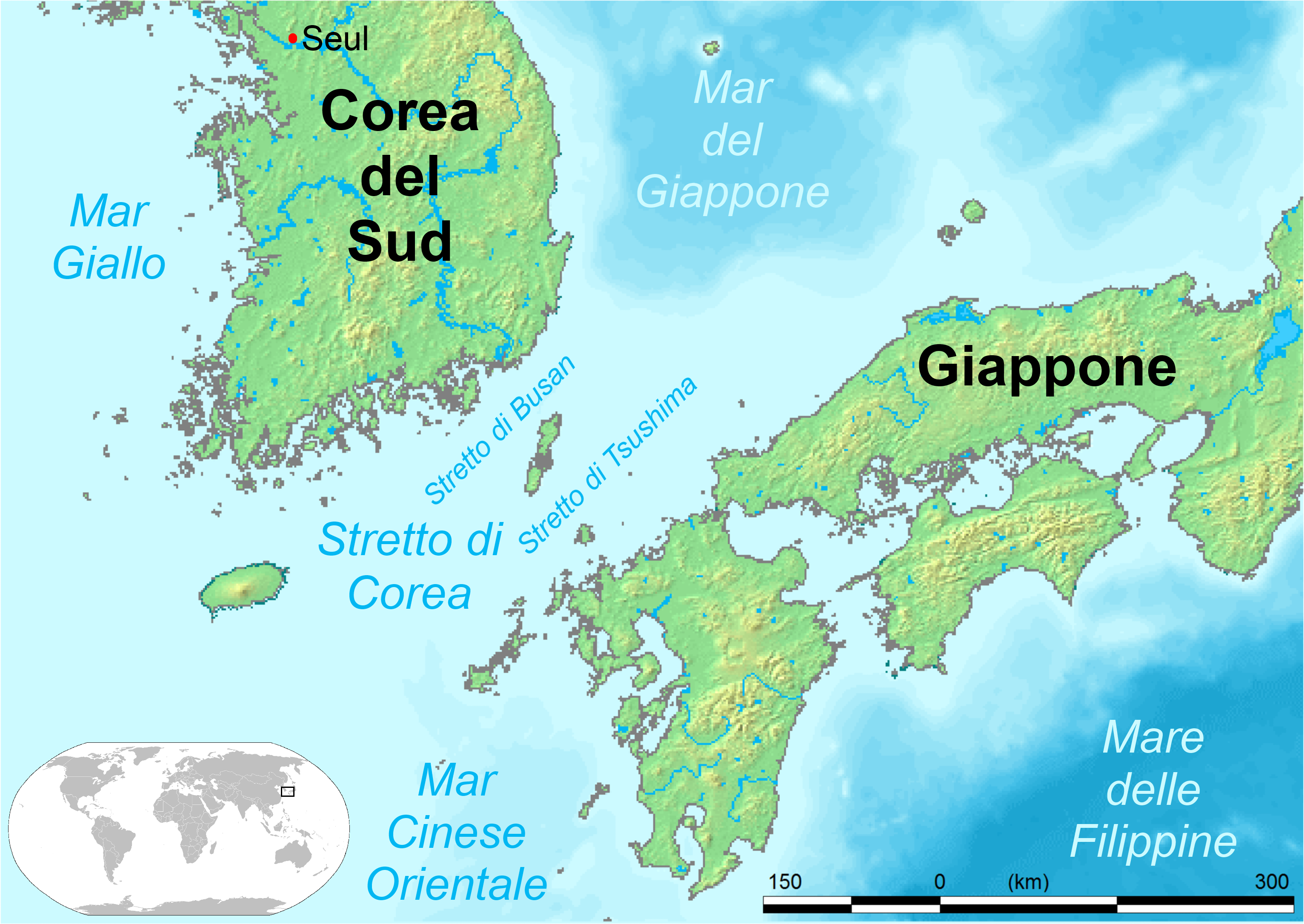 Mappa dello stretto di Corea, con indicati gli stretti di Busan e Tsushima.